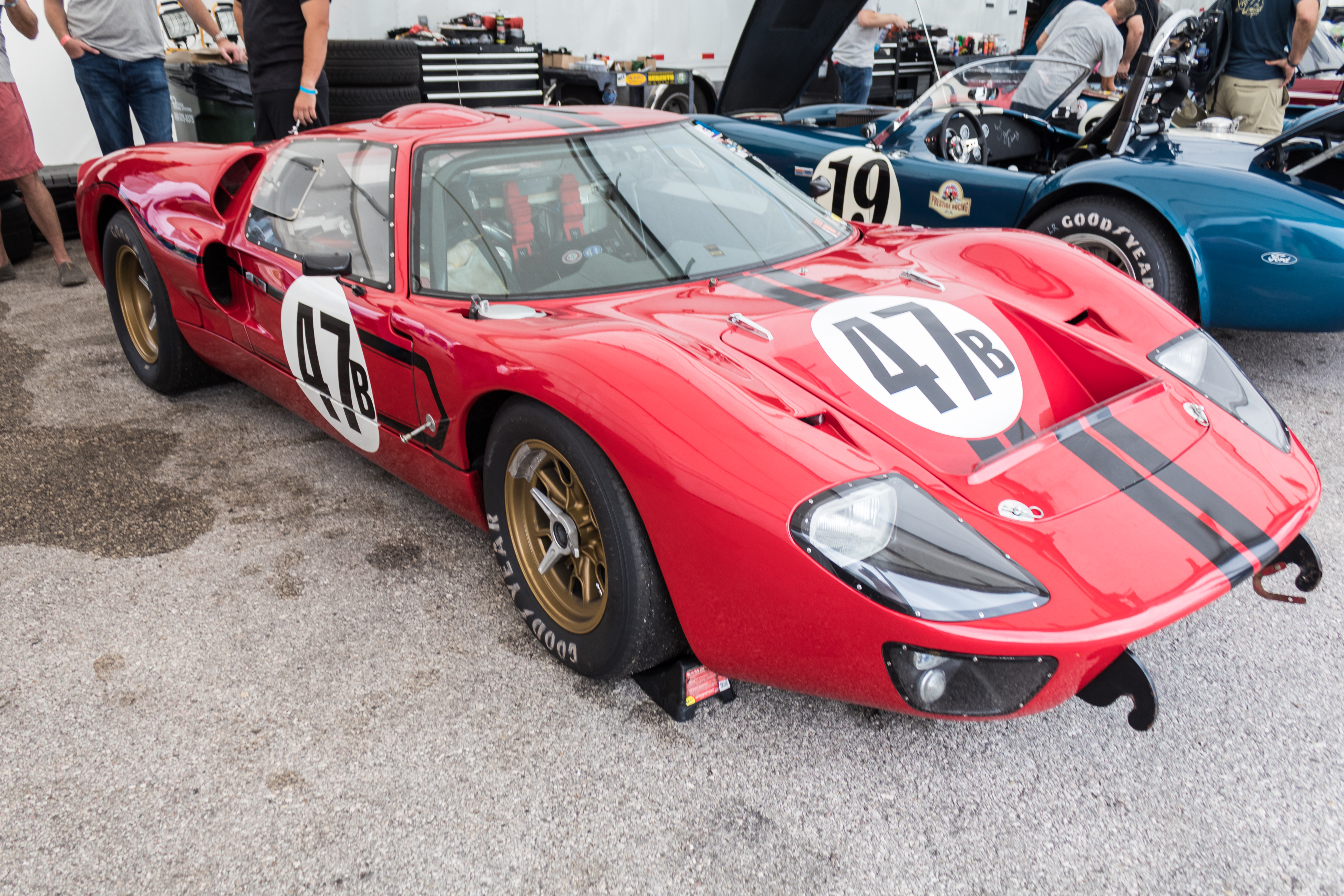 I'm not happy until I see a GT40